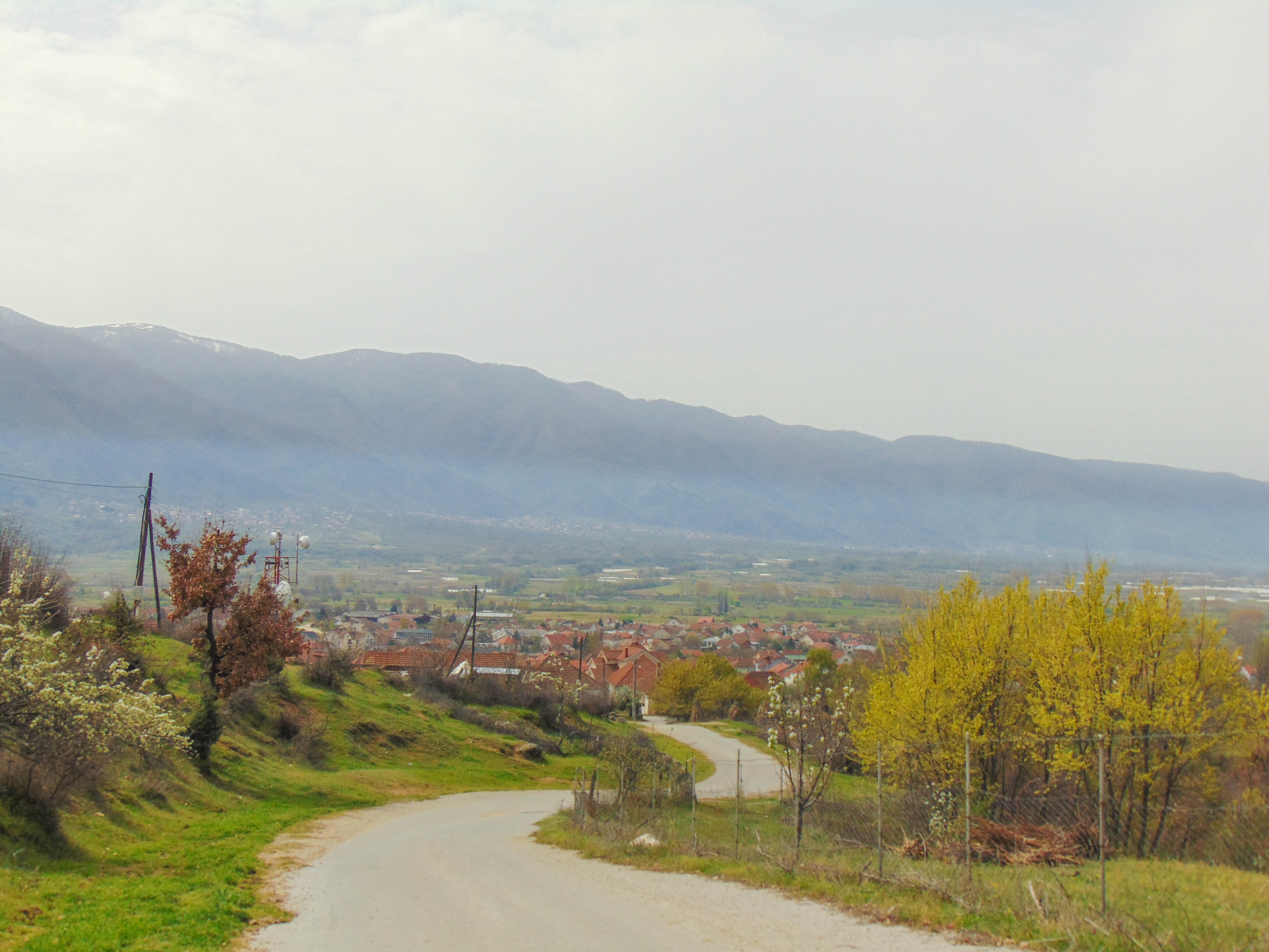 Ново Село